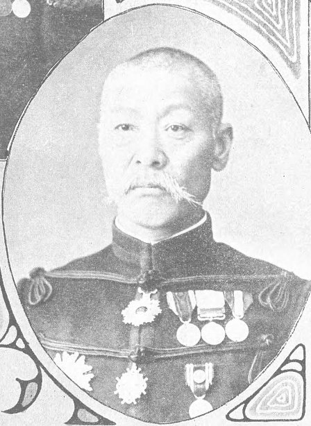 原口兼済（1847-1919）